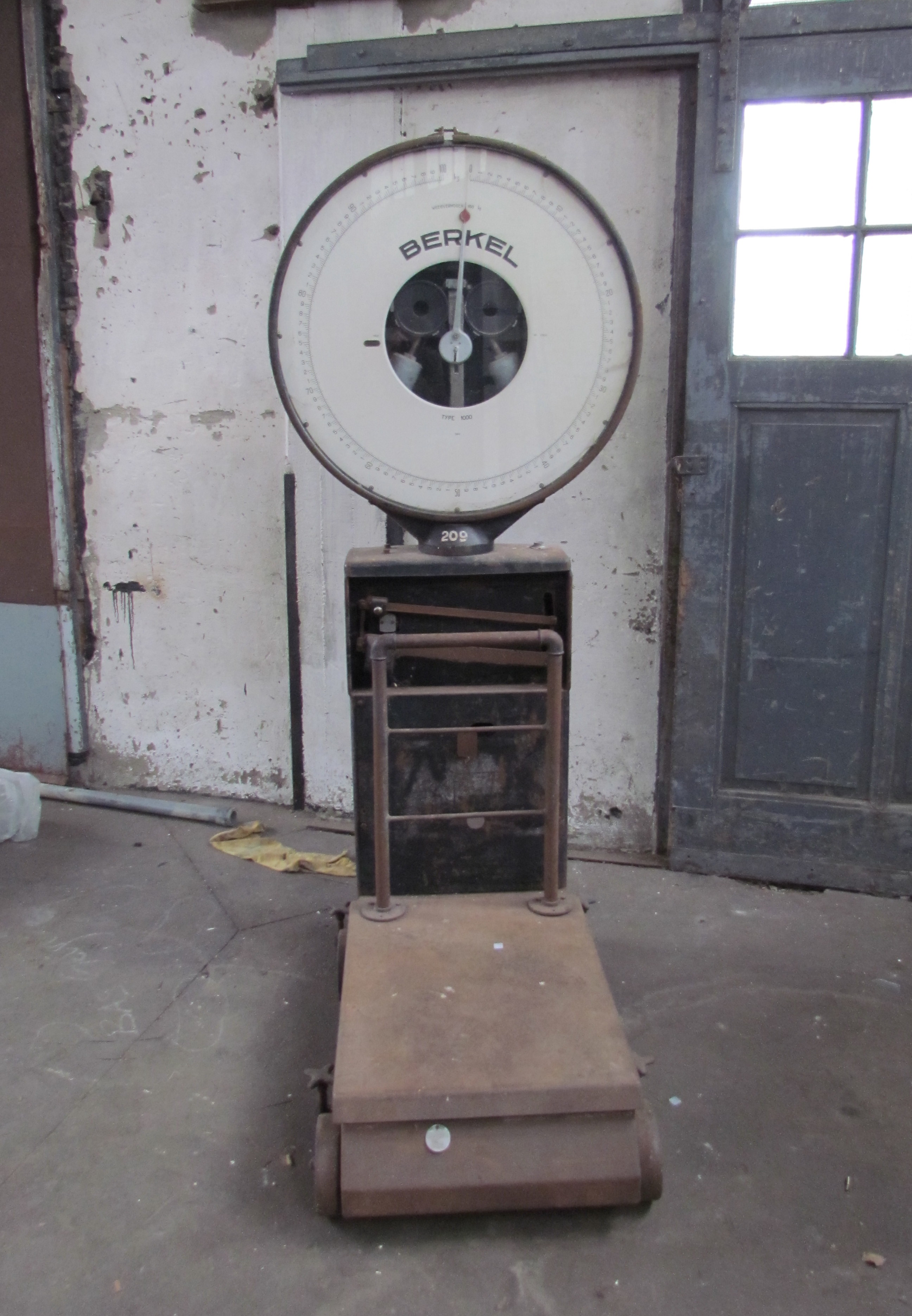 Berkel Standwaage, Typ 1000